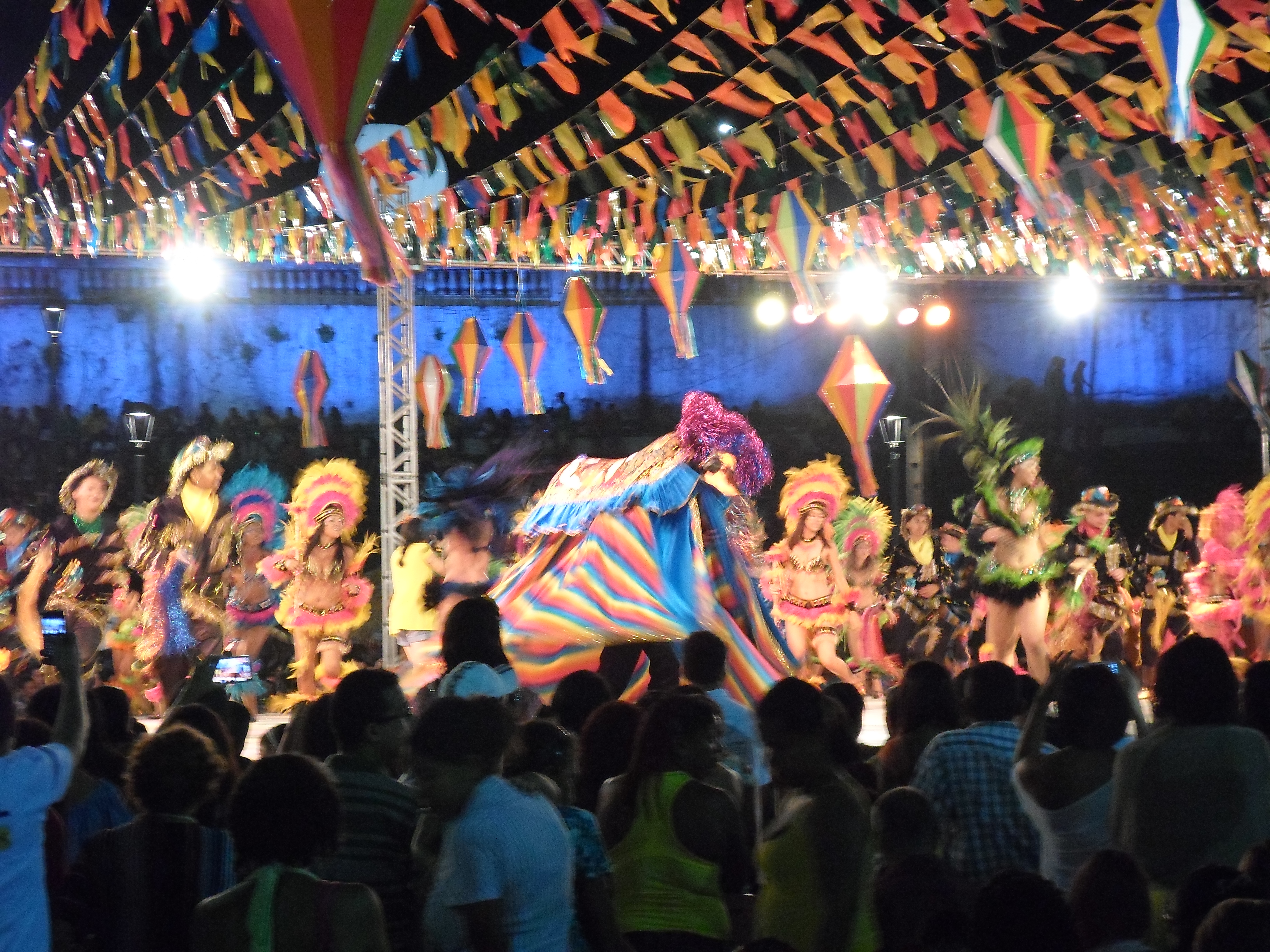 Apresentação do Boi de Axixá (orquestra) em 28 de junho de 2014, na Praça Maria Aragão (São Luís)